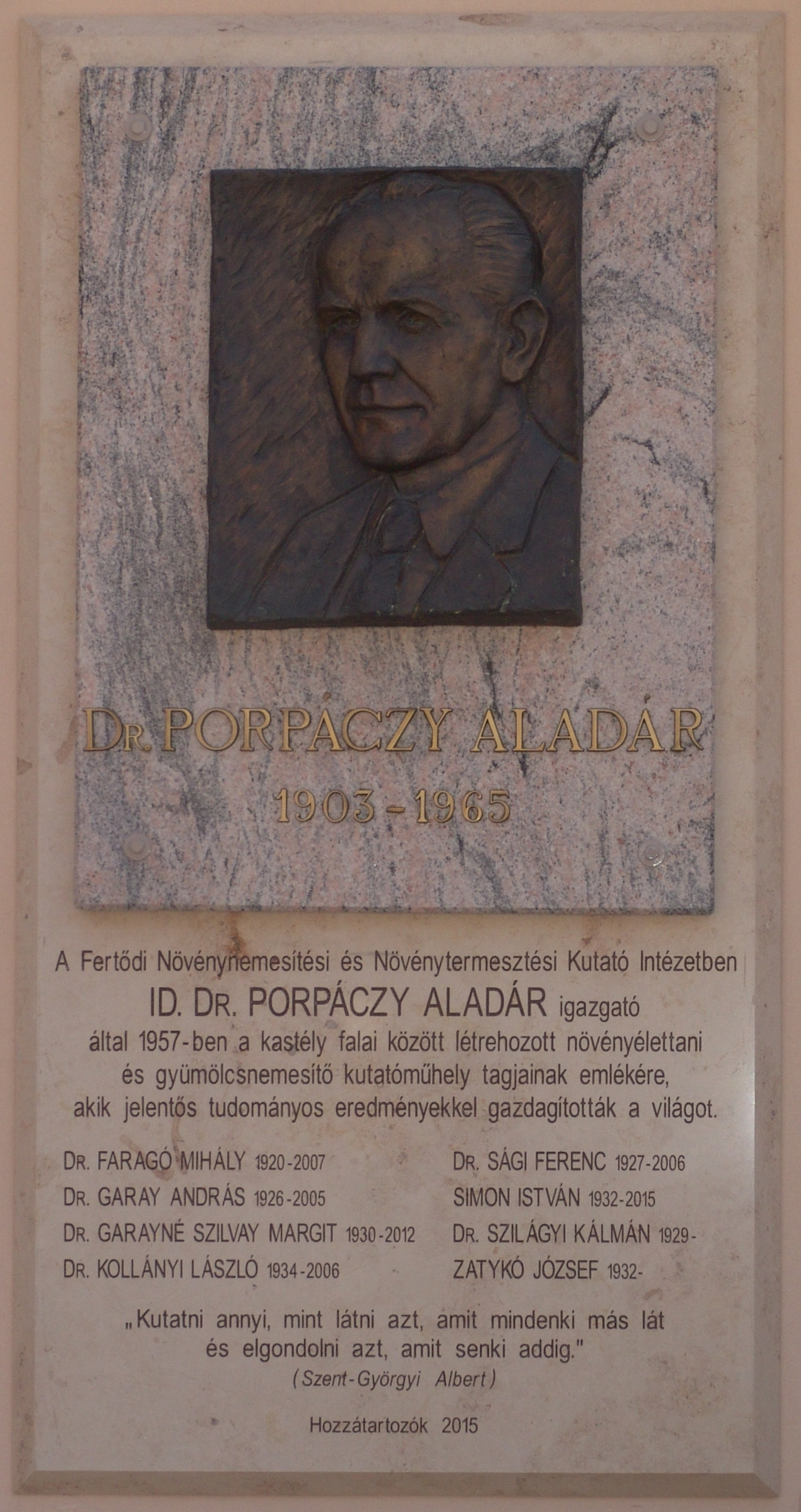 Domborműves emléktábla (Beliczay Mária, 2000) - Fertőd, Joseph Haydn út 2., Az Esterházy kastély kapuján belépve, bal kéz felől egy boltíves fülkében látható az emléktábla. - Alatta: A Fertődi Kertészeti Kutató Intézetben melyet 1957-ben a kastély falai között létrehozott növényélettani és gyümölcsnemesítő kutatóműhely tagjainak emlékére készült a második tábla. A 2015-ös tábla felirata a következő: A Fertődi Növénynemesítési és Növénytermesztési Kutató Intézetben / ID. Dr. Porpáczy Aladár igazgató / által 1957-ben a kastély falai között létrehozott növényélettani / és gyümölcsnemesítő kutatóműhely tagjainak emlékére, / akik jelentős tudományos eredményekkel gazdagították a világot. / (kutatók nevei évszámokkal, és egy Szentgyörgyi Albert idézet.) / Hozzátartozók 2015. - Megj. Jelenleg a Fertődi Kertészeti Kutató Intézet nem a kastélyban és nem is Eszterházán van. (kozterkep.hu)